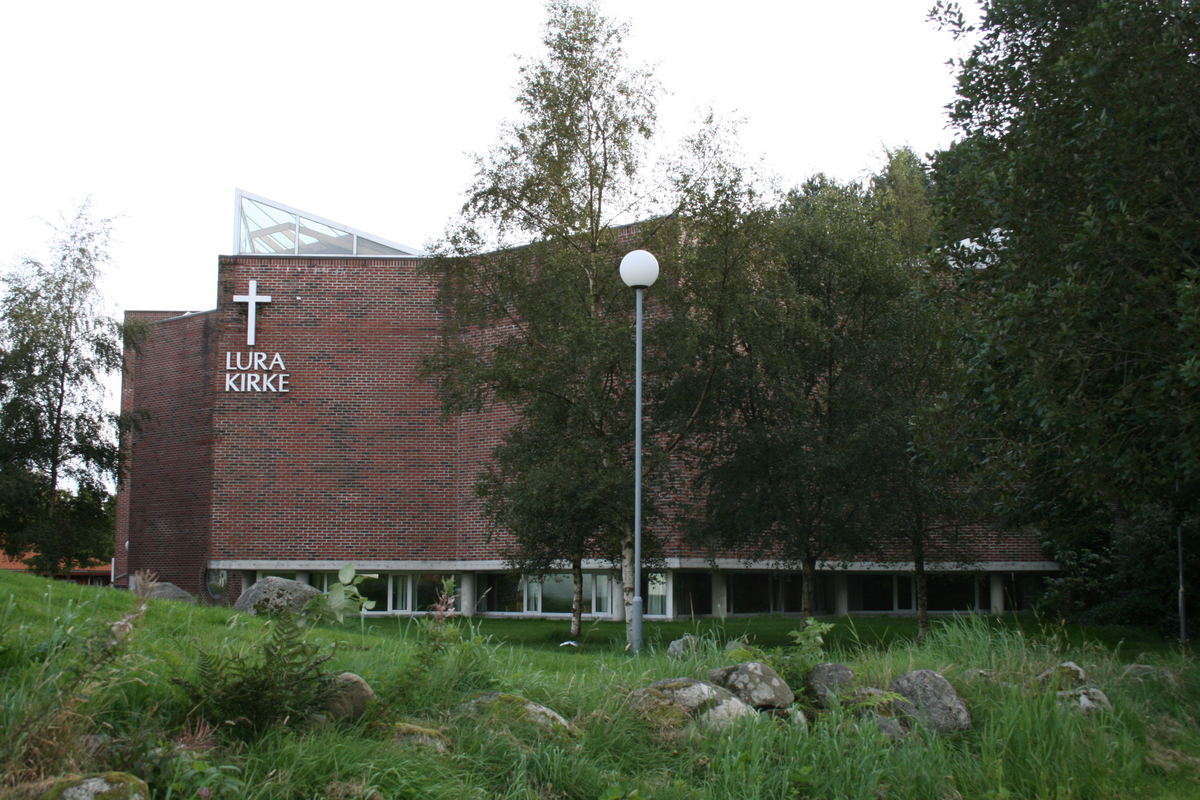 Lura kirke, Sandnes